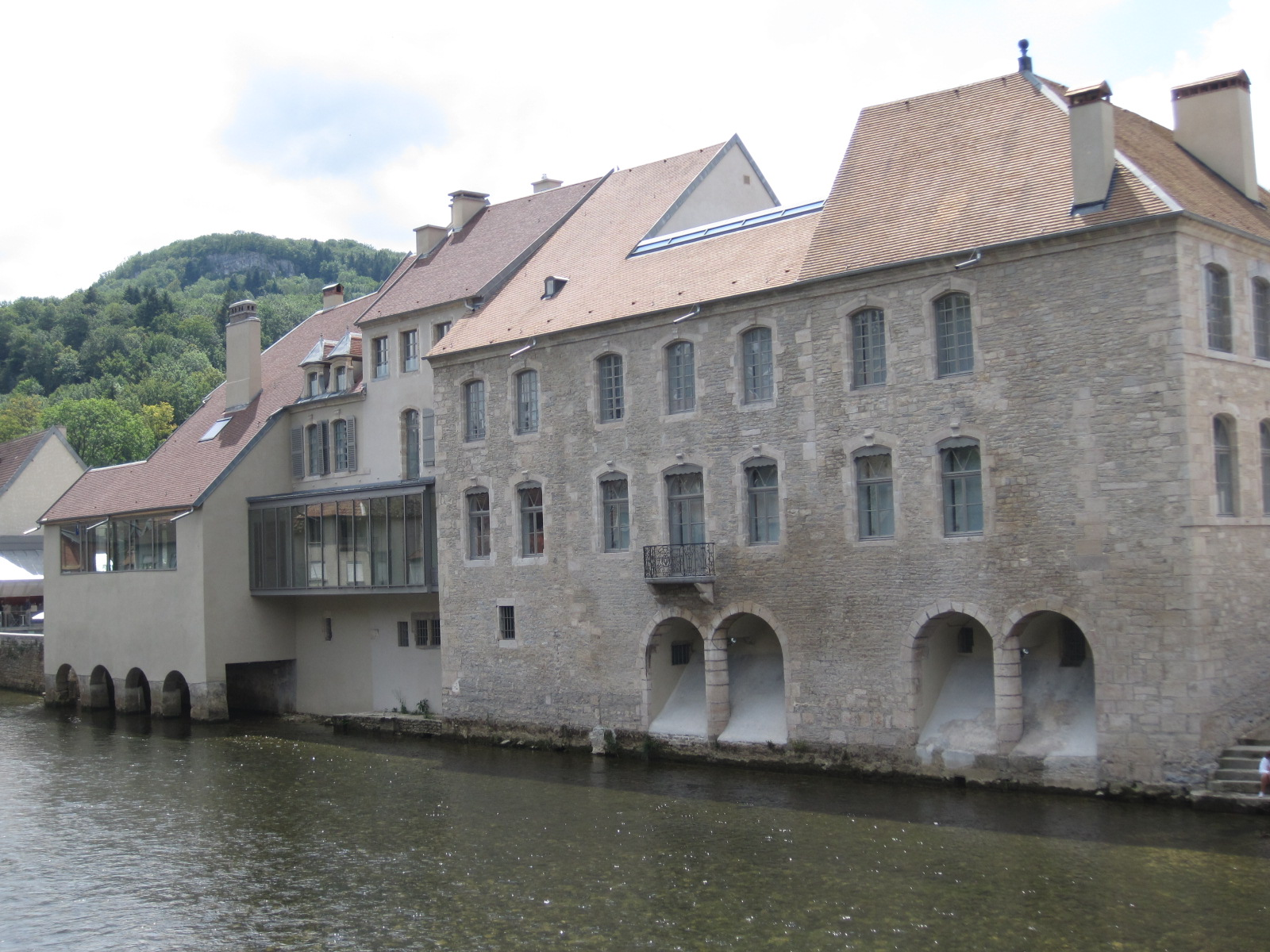 Musée Courbet - Ornans - Franche Comté